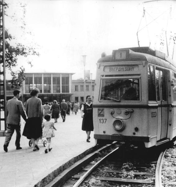 Zentralbild-Voigt Vgt-Qu 14.6.1961 Potsdam-Hauptbahnhof Der neuaufgebaute Hauptbahnhof der Bezirksstadt Potsdam. Hier endet die Linie 1, die mit ihren modernen Strassenbahnzügen täglich viele Besucher zum Park von Sanssouci bringt.